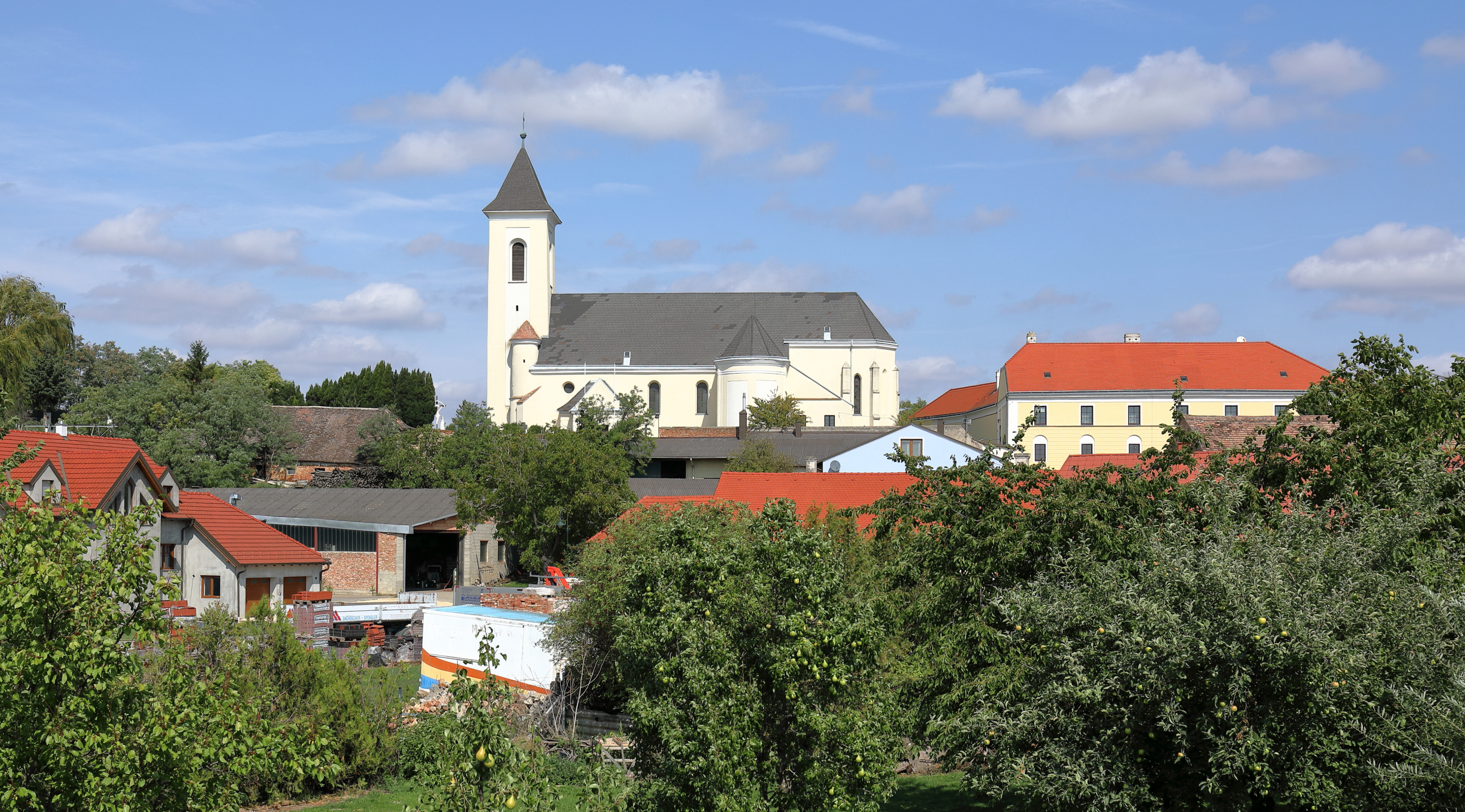 Südansicht der röm.-kath. Pfarrkirche hl. Stephanus in der niederösterreichischen Gemeinde Gaubitsch.Die in erhöhter Lage im Norden des Ortes errichtete Kirche hat ein romanisches Langhaus (13. Jahrhundert) mit gotischem Chor (14. Jahrhundert) und Westturm. Mitte des 18. Jahrhunderts erfolgten barocke Um- und Anbauten und der gotische Turm wurde im 19. Jahrhundert verändert.